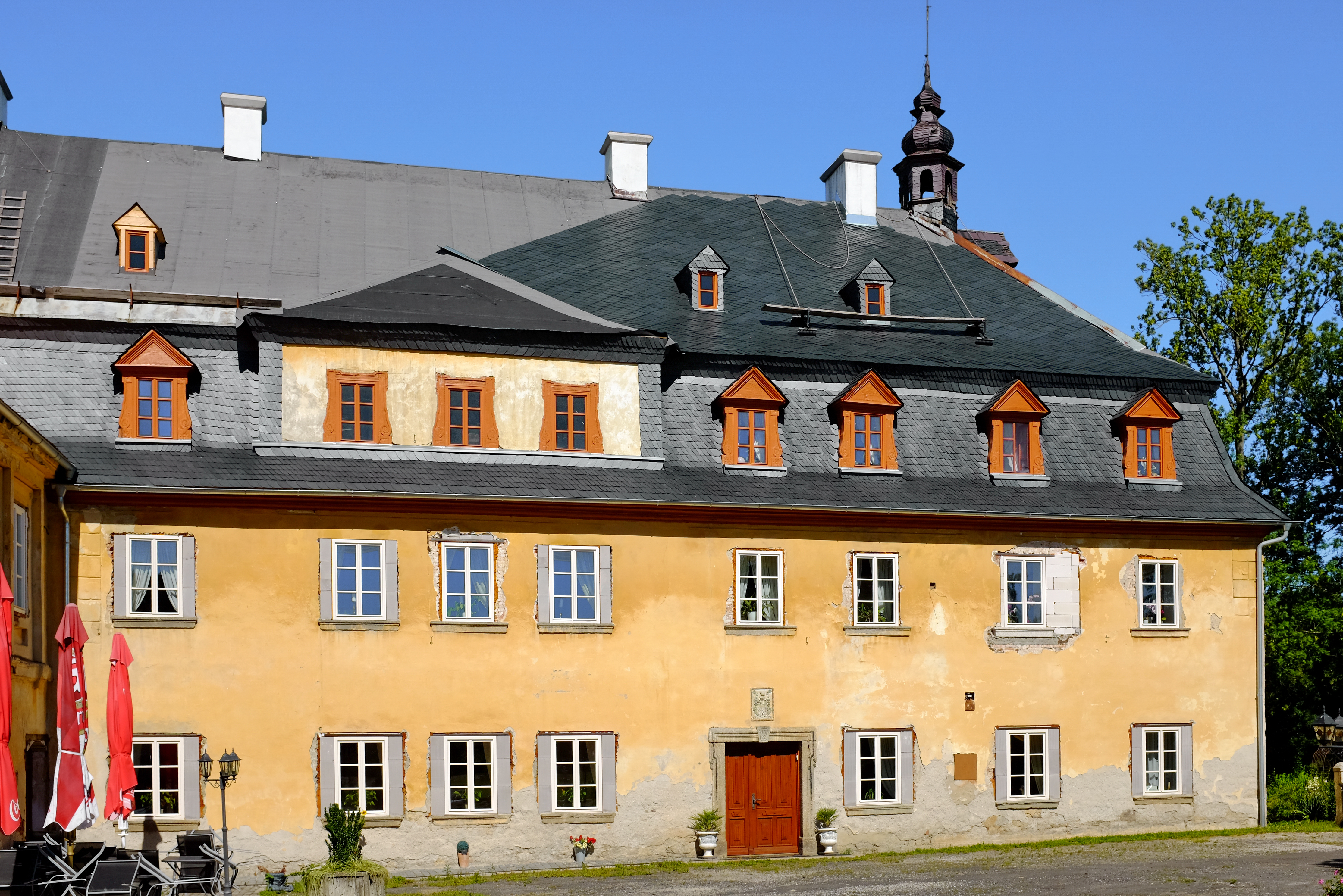 Dvorec čp. 1, Spálená 1, Spálená.